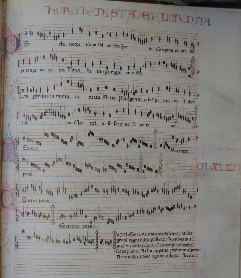 Codex Squarcialupi